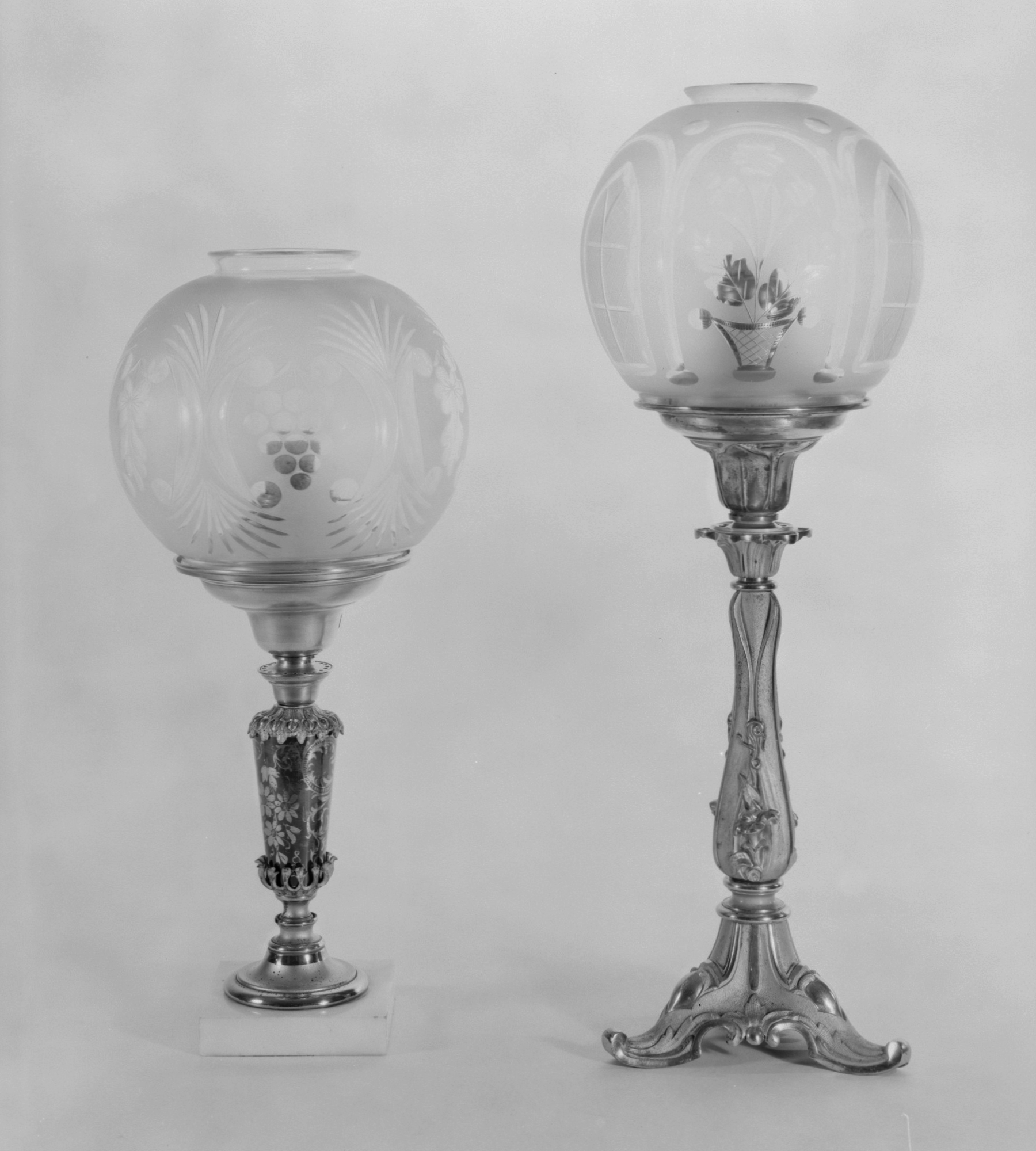 American; Astral lamp; Metal